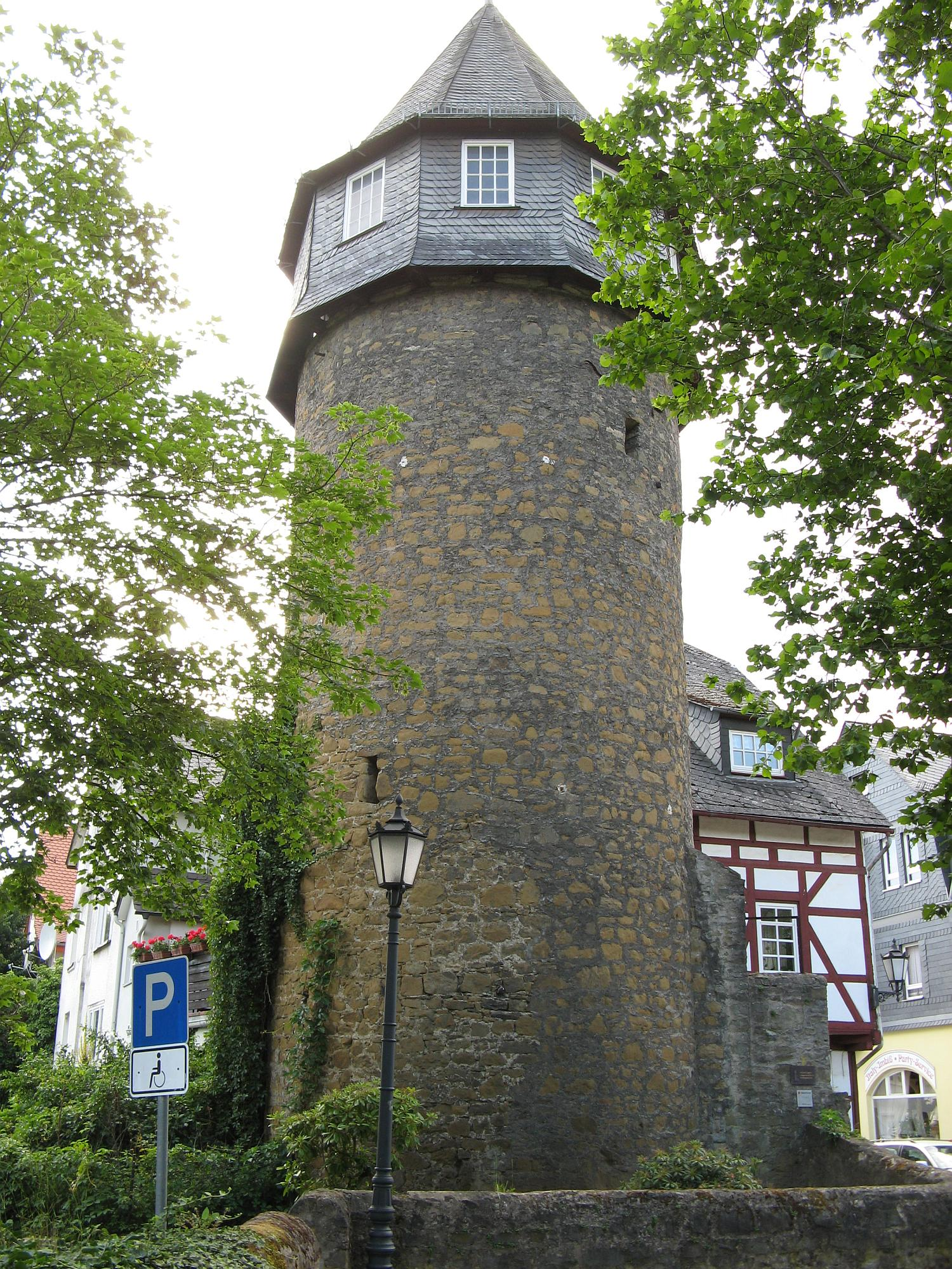 Der Hexenturm der ehemaligen Herborner Stadtmauer